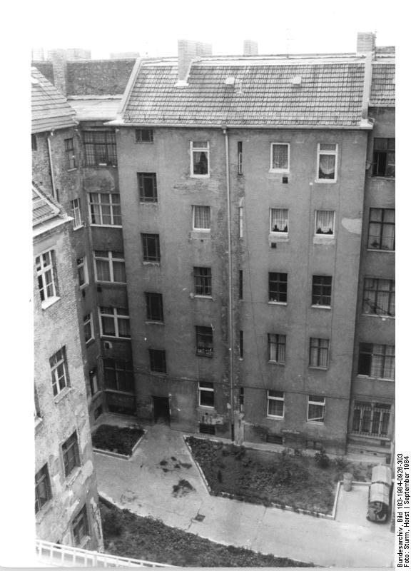 Für Bezieher des ADN-Reportagedienstes! Zum Beitrag: Da lacht die Sonne gleich anders - Wie die "Schliemann 18" ihren Höfen den Hof macht ADN-ZB-Sturm - 26.9.1984 - bb - Ein Paradebeispiel ist das Grundstück Schliemannstraße Nr. 18 im Berliner Stadtbezirk Prenzlauer Berg wahrhaftig nicht - abere es ist ein Beispiel, wie mit wenigen Mitteln auch in alten Häusern manches für eine gefälligere Wohnumwelt getan werden kann, wenn viele mit anpacken. Das Haus mit Seitenflügel und Hinterhaus stammt noch aus den achtziger Jahren des vorigen Jahrhunderts. Es erhielt in den letzten Jahren erst einmal ein neues Dach. Mit der grundlegenden Modernisierung wird es noch warten müsse, aber die Mieter packten zu, entrümpelten die zwei engen, bisher sehr unansehnlichen Höfe, hackten einen Teil des Betonbodens auf, um Mutterboden auftragen und Grün pflanzen zu können. So sieht der vordere Hof nun wenigsten ordentlich, sauber und schon wesentlich freundlicher aus. (Foto)